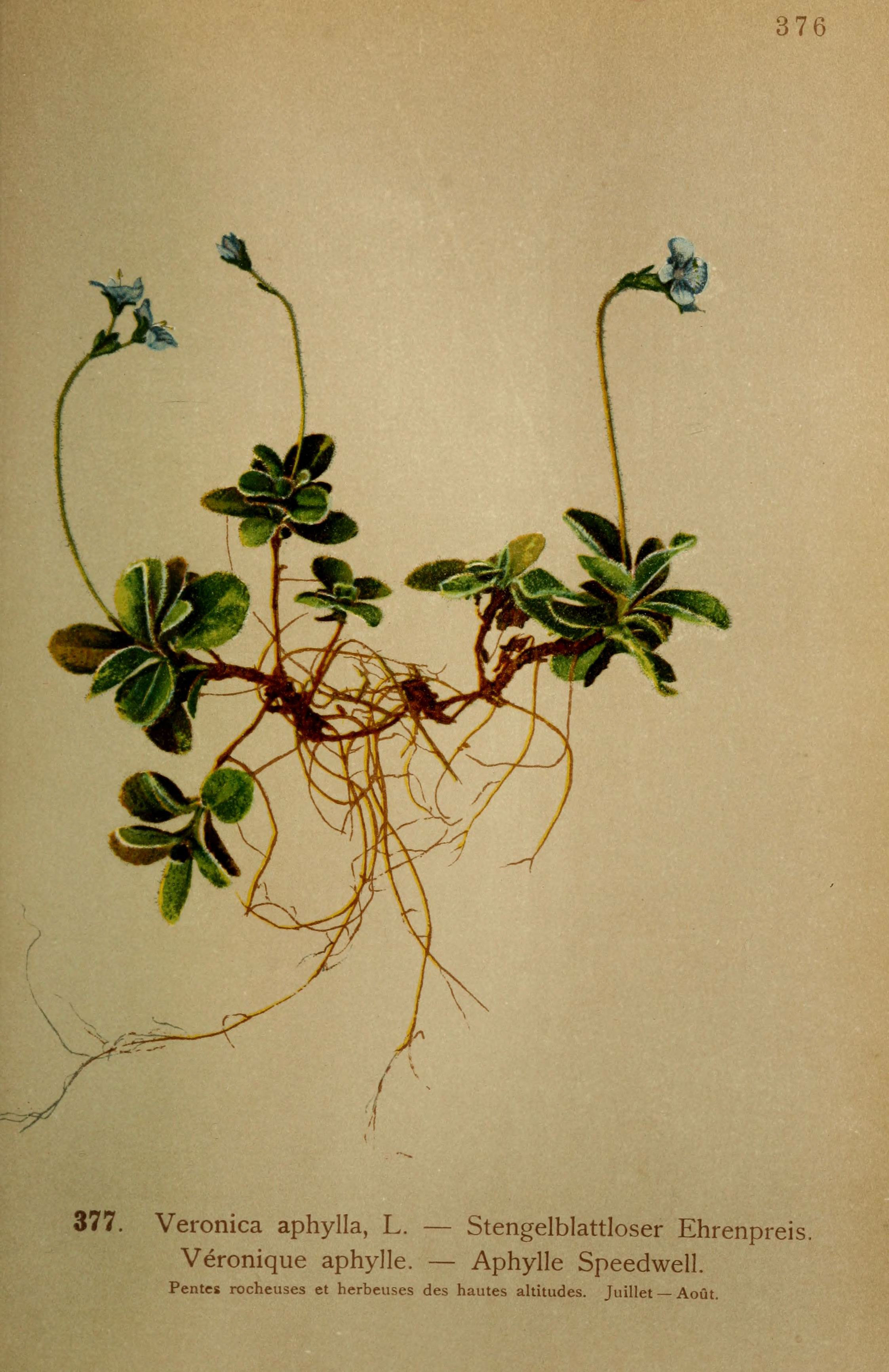 376 377. Veronica aphylla, L. — Stengelblattloser Ehrenpreis. Véronique aphylle. — Aphylle Speedwell. Pentes rocheuses et herbeuses des hautes altitudes. Juillet — Août.